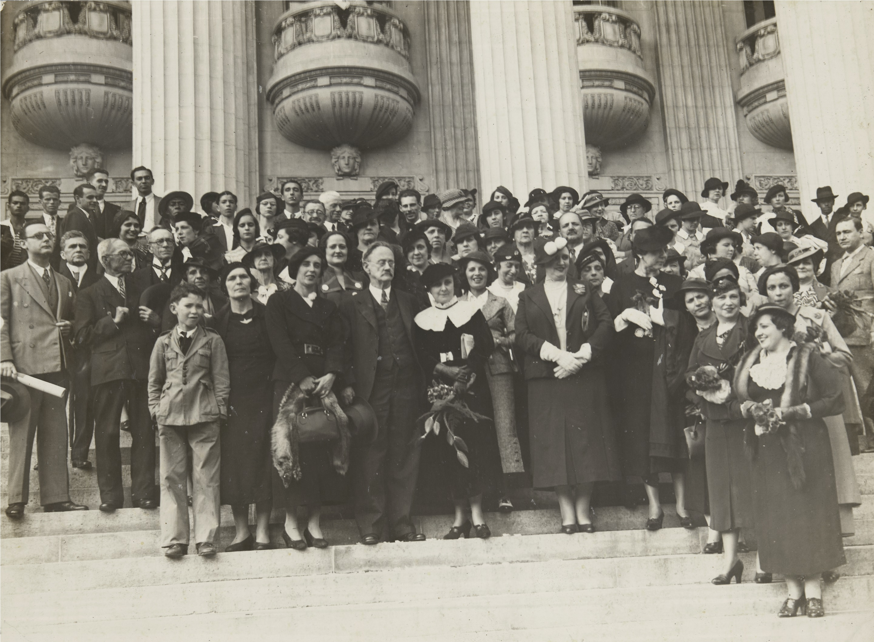 Fotografia de Bertha Lutz após cerimônia de posse com familiares, feministas e outros nas escadarias da Câmara dos Deputados, Rio de Janeiro, RJ. Fundo: Federação Brasileira pelo Progresso Feminino.